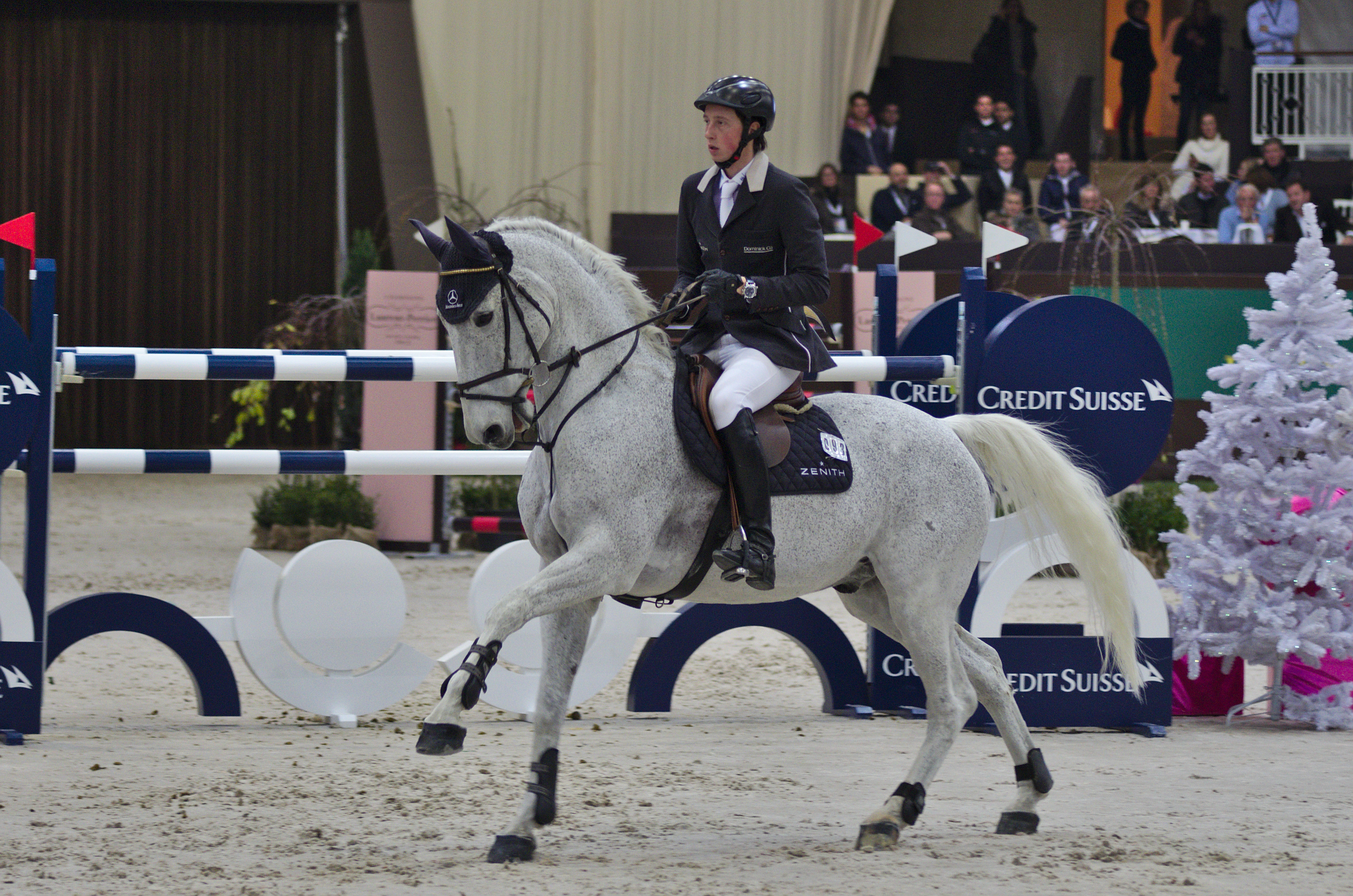 CHI Genève 2013 - 20131212 - Martin Fuchs et Principal 12